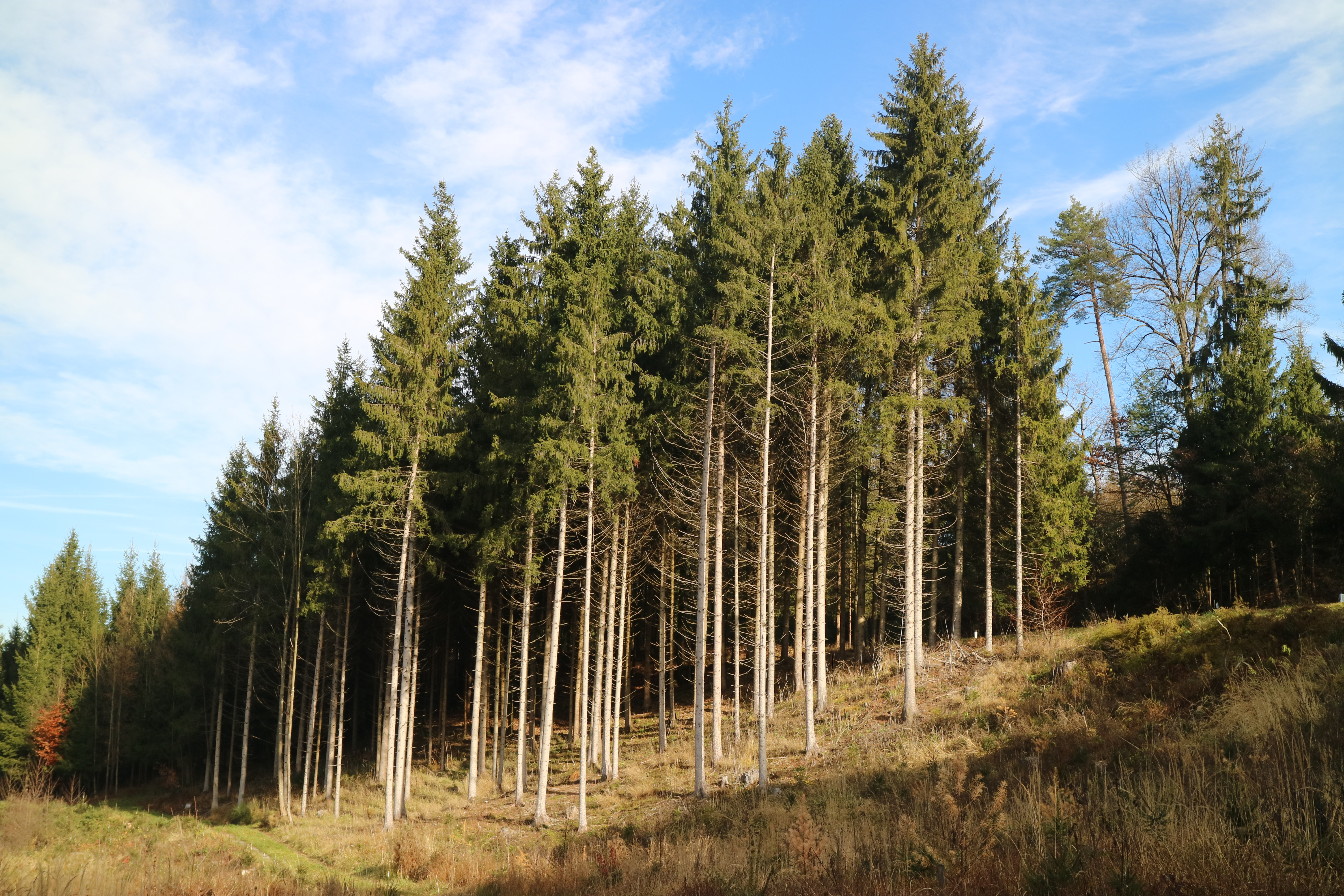 Fichtenmonokultur im Kaiserwald (Gemeinde Premstätten)